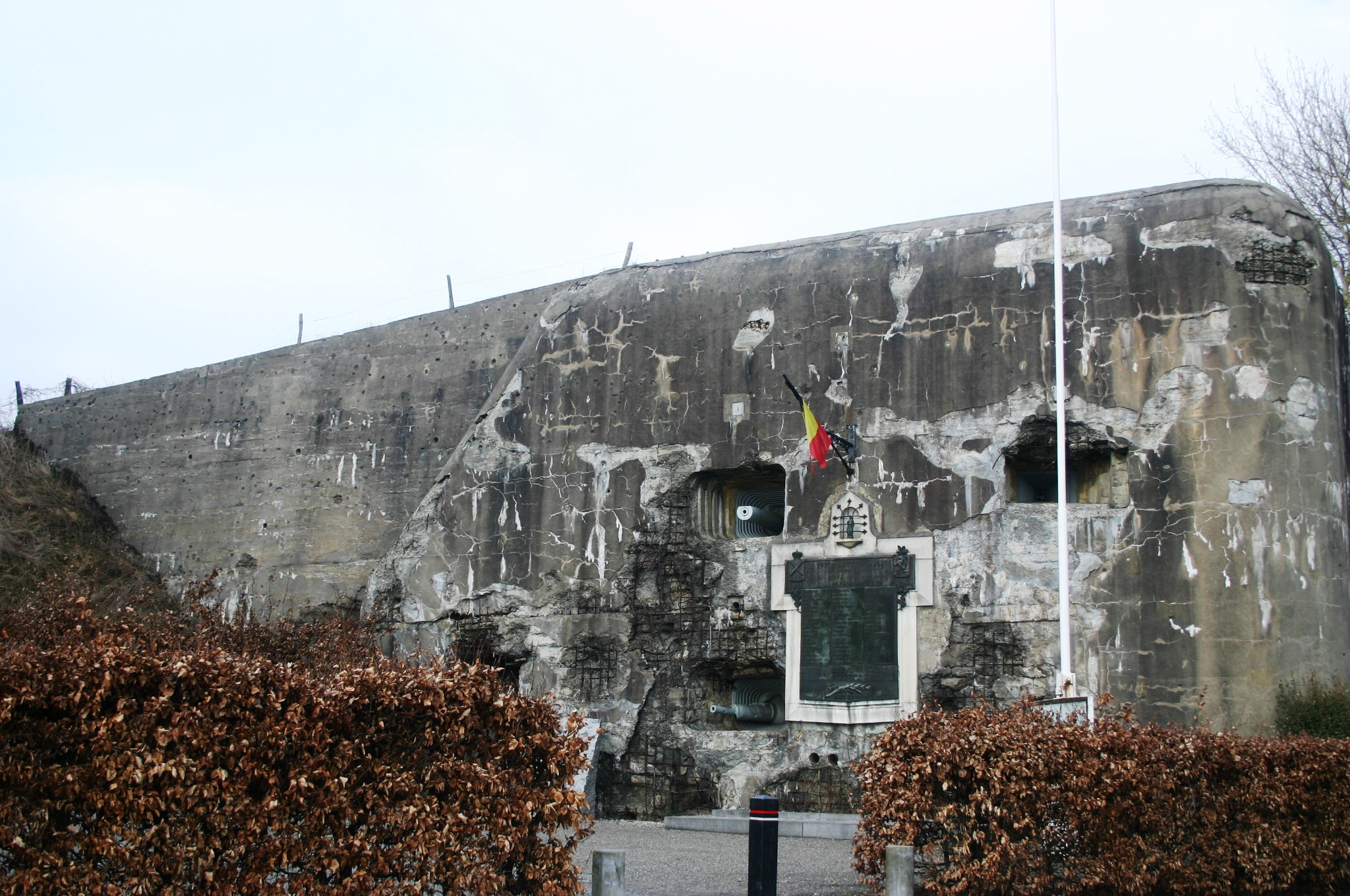 Fort de Battice.